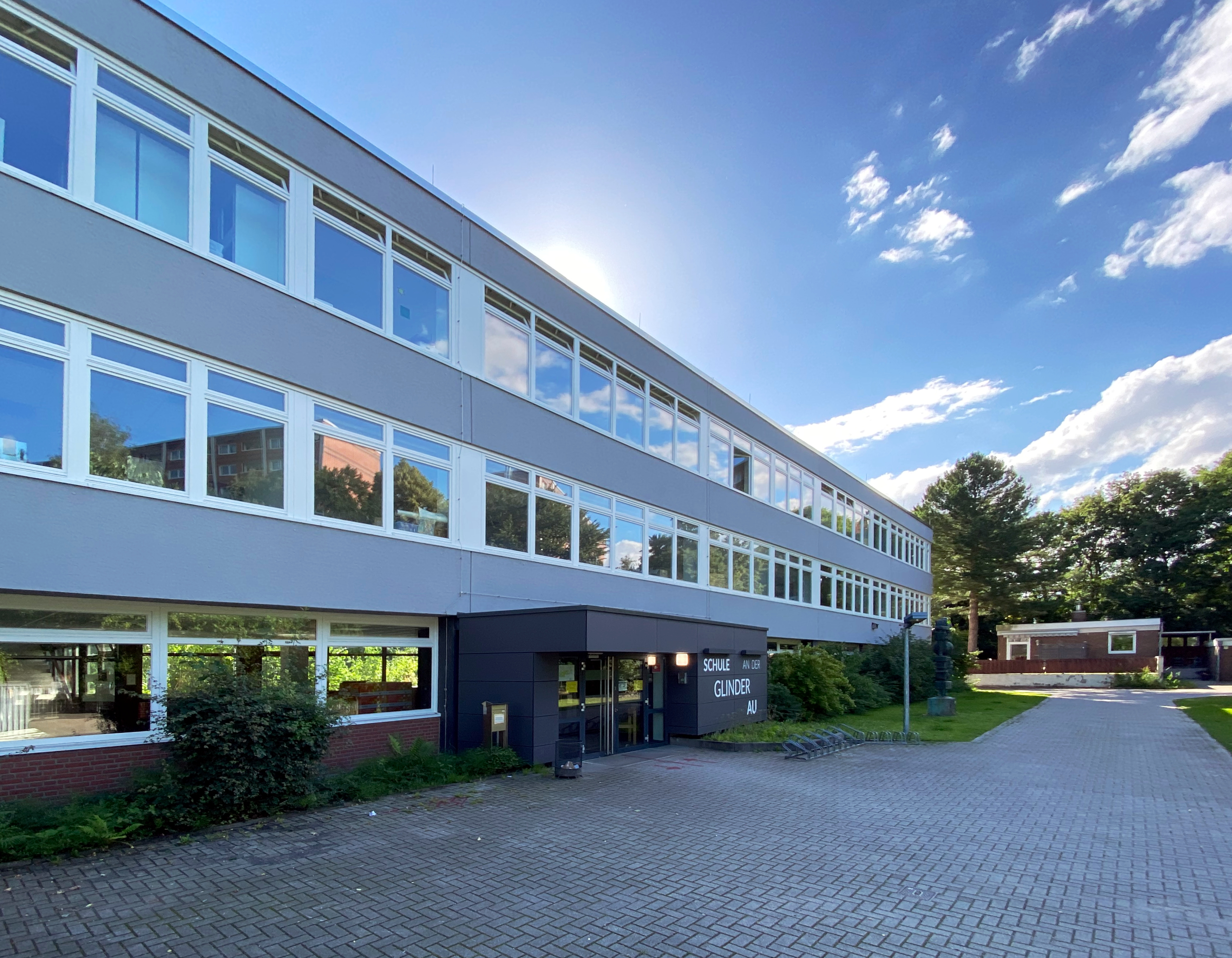 Schule An der Glinder Au in Hamburg-Billstedt, Nordseite des Doppel-H-Gebäudes